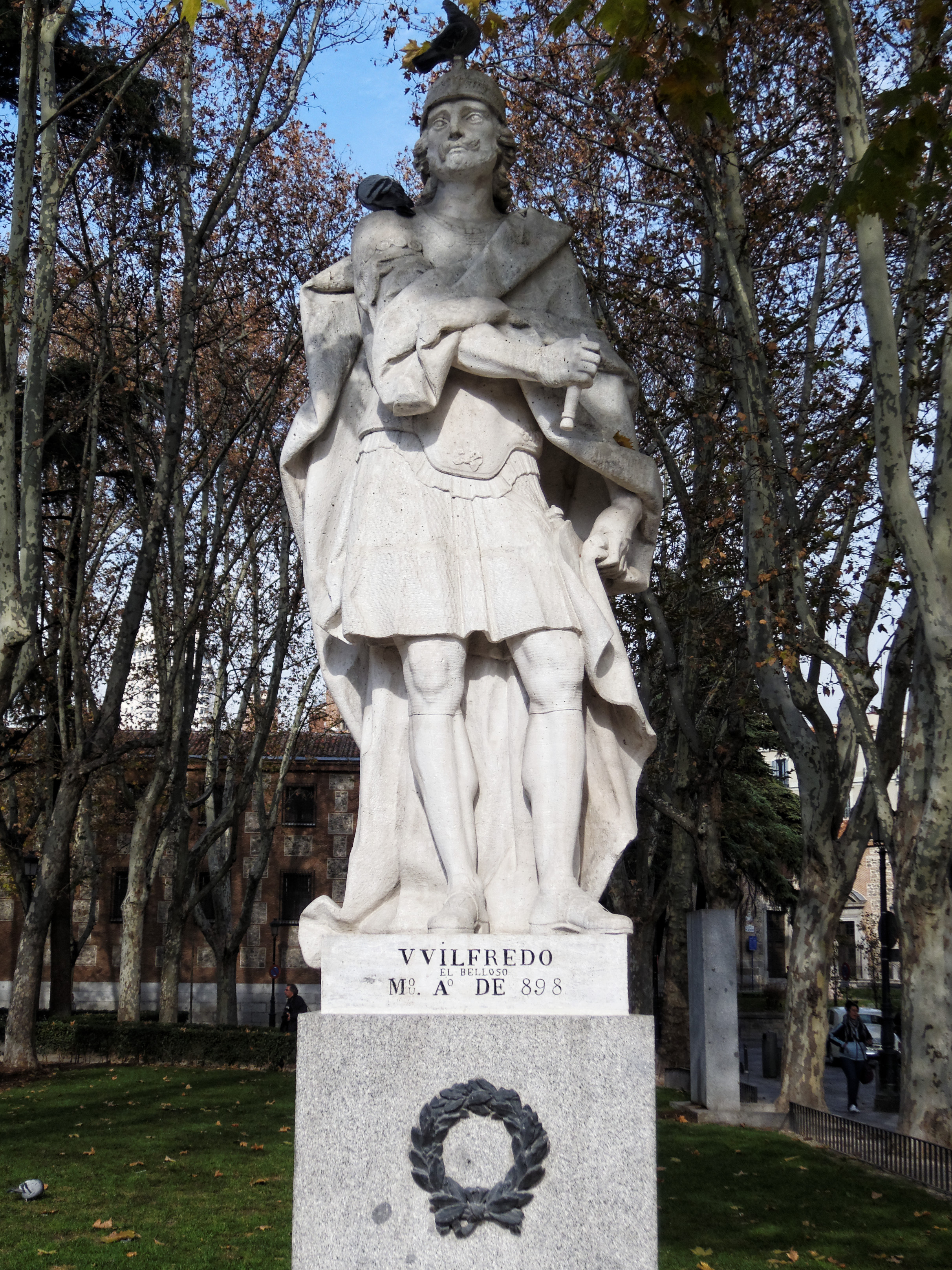 Estatua de Wifredo el Velloso (también conocido como Wilfredo, Vilfredo, Guifredo o Guilfredo) (840-897), conde de Urgel y de la Cerdaña, de Barcelona y Gerona y de Osona, en la Plaza de Oriente de Madrid.